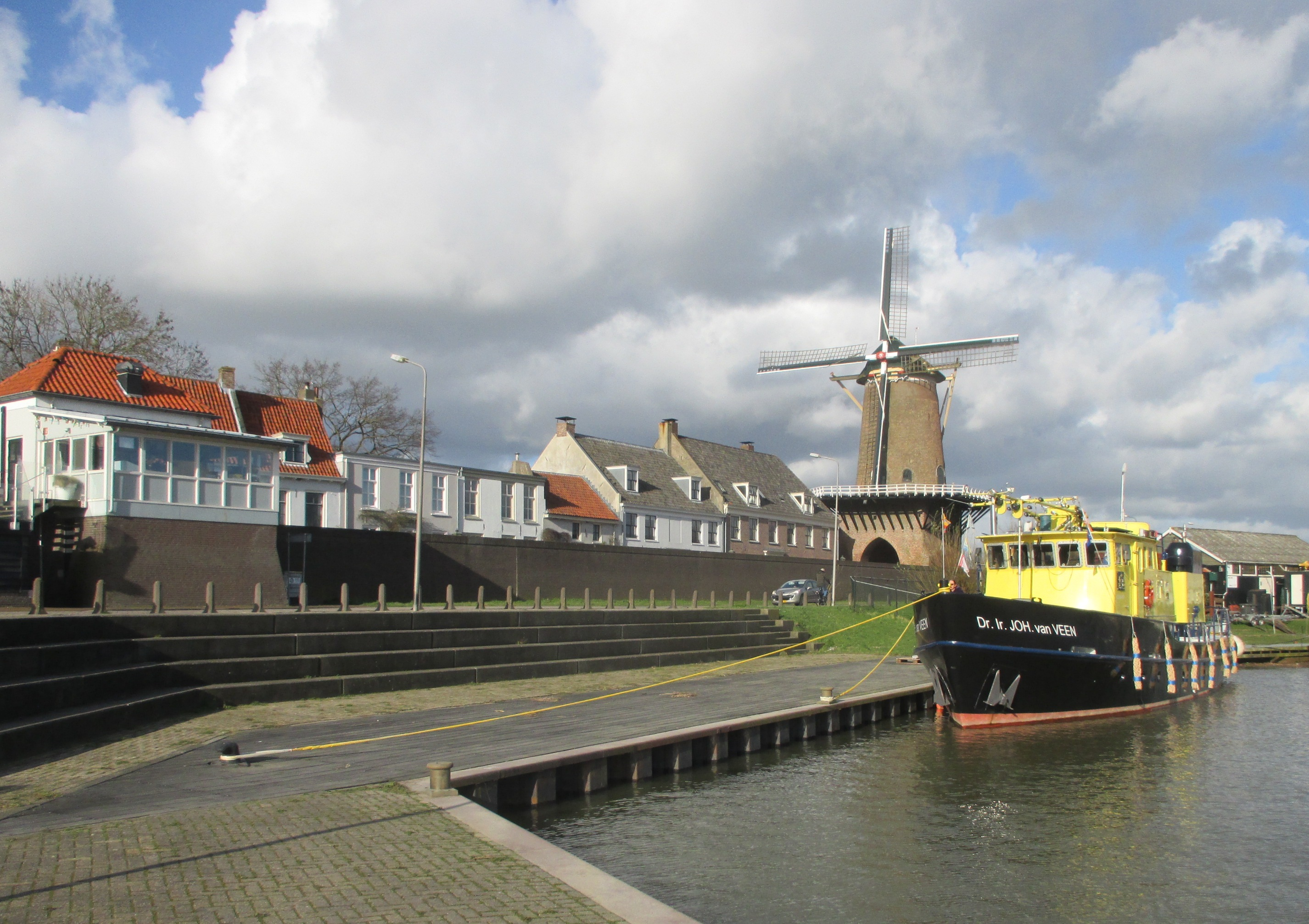 Haven Wijk bij Duurstede. Kijkend vanaf parkeerplaats in oostelijke richting.